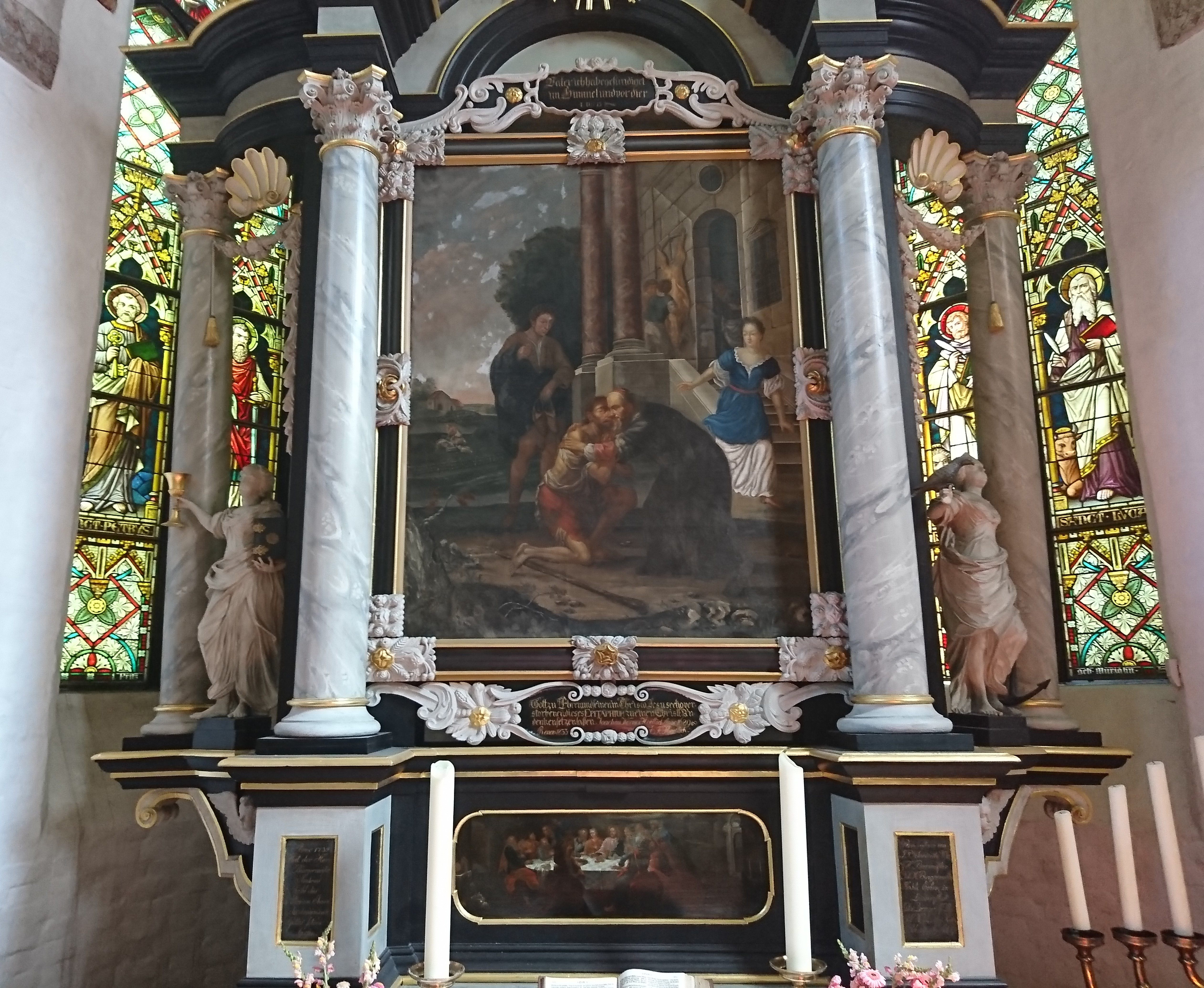 Gemäldeepitaph Heimkehr des verlorenen Sohnes (Öl auf Leinwand, 174 × 221 cm), gestiftet von Joachim Werner Höltch. Die Inschrift im Holzrahmen besagt, dass er es seinen Verstorbenen habe setzen lassen. 1833 ließ es der Möllner Bürgermeister Eggert Friedrich Höltich (auch Hoeltich) restaurieren (laut Inschrift renoviert). Es hing an der Nordwand und wurde 1967 in den barocken Hochaltar der St. Nikolai in Mölln eingefügt. Von 1888 bis 1967 zierte stattdessen das 1888 von Johanna Dorothea Elisabeth Hoeltich gestiftete Gemälde von Mathilde Block, eine Kreuzigungsgruppe, den Altar. Es hängt heute auf der Rückseite des Altares, für Besucher nur mit Erlaubnis sichtbar, da der Zugang hinter dem Altar sonst nicht erlaubt ist.1998 oder 1999 wurden beide Bilder von einem Restaurator gereinigt.